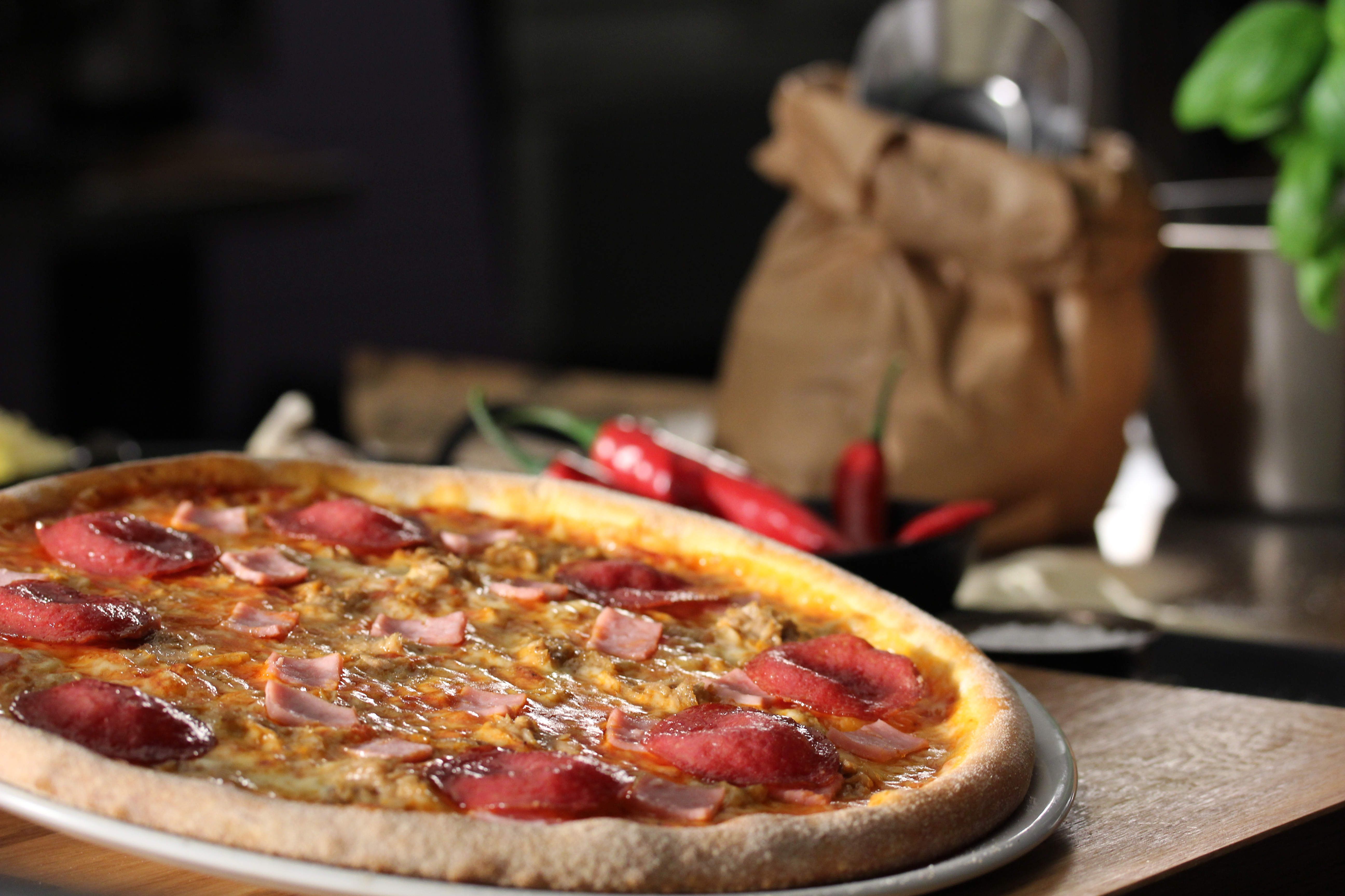 Special Opera on yksi Kotipizzan myydyimmistä pizzoista.